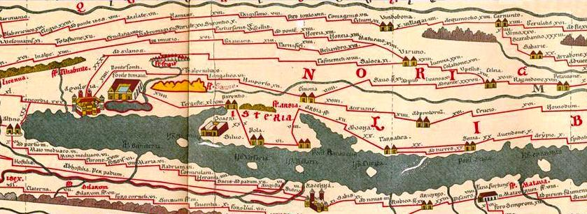 Questo File è stato ricavato (estrazione dettaglio) da un’altra immagine in archivo COMMONS – File:Tavola Peutingeriana – Miller .jpg inserita il 4 mar 2014 da utente A.furieri